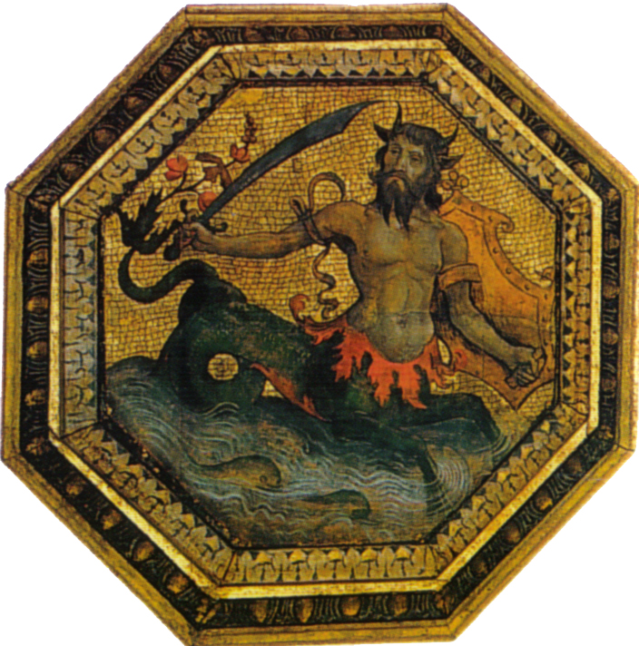 Ittiocentauro